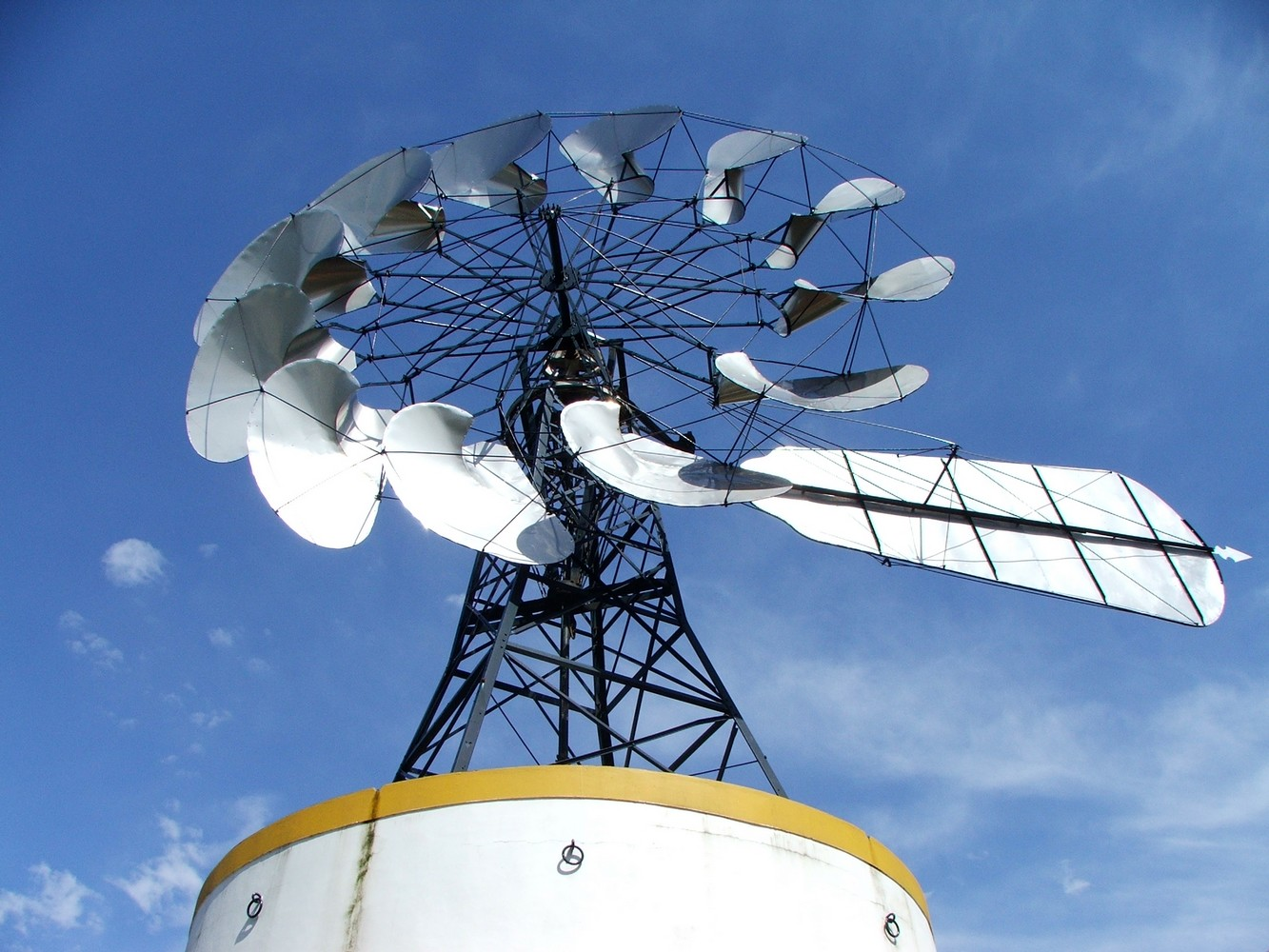 Moinho de armação metálico, localizado em Ervosas, no concelho de Ílhavo.